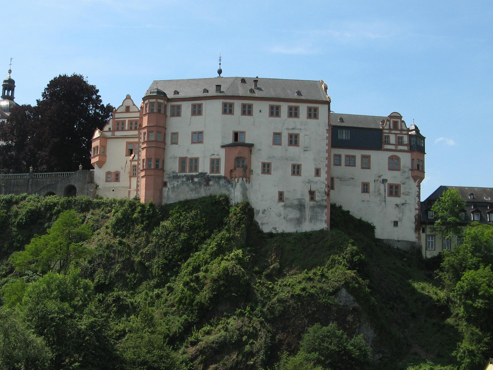 Ostflügel des Hochschlosses zu Weilburg, Hessen, Deutschland, erbaut 1878